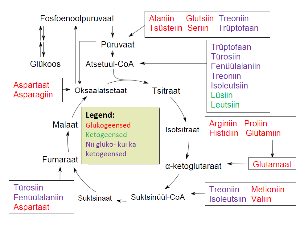 Aminohapete katabolism. Tõlgitud inglise keelest